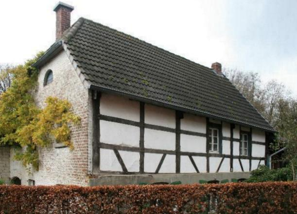 Fachwerkhaus in Wegberg-Gripekoven